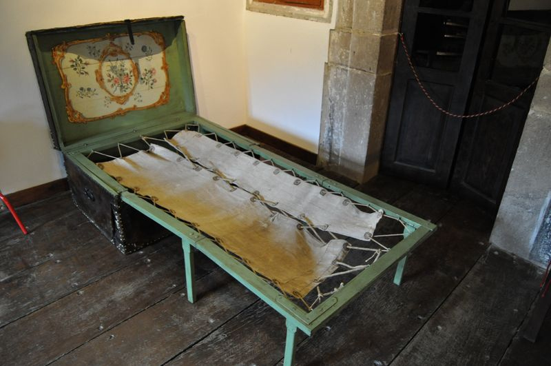 Cama de campaña. La cama de Campaña del S. XVIII perteneció al General Gregorio de la Cuesta, uno de los antepasados familiares.